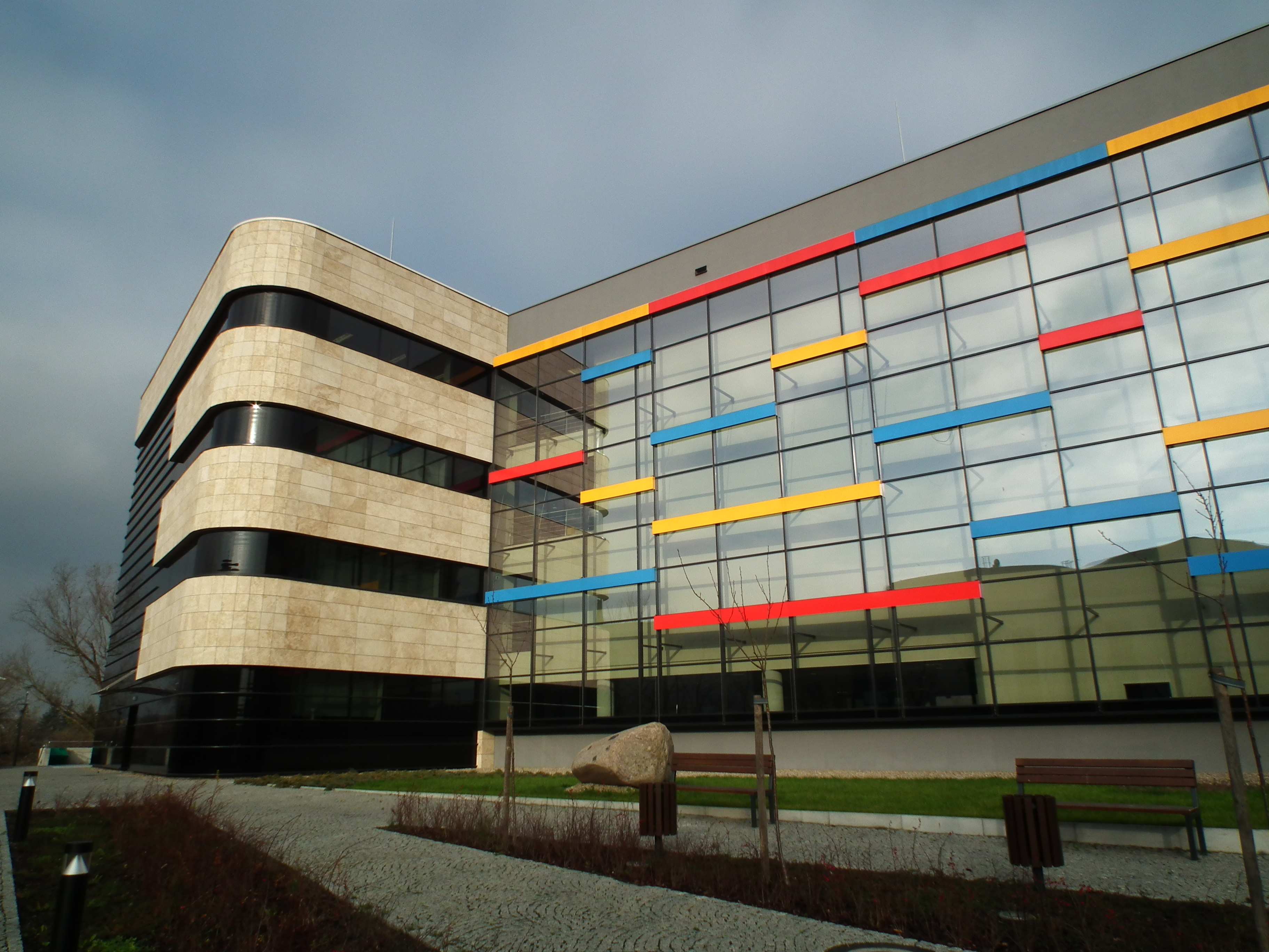 Wydział Technologii Chemicznych - Politechnika Poznańska, Berdychowo, Kampus. Poznań.